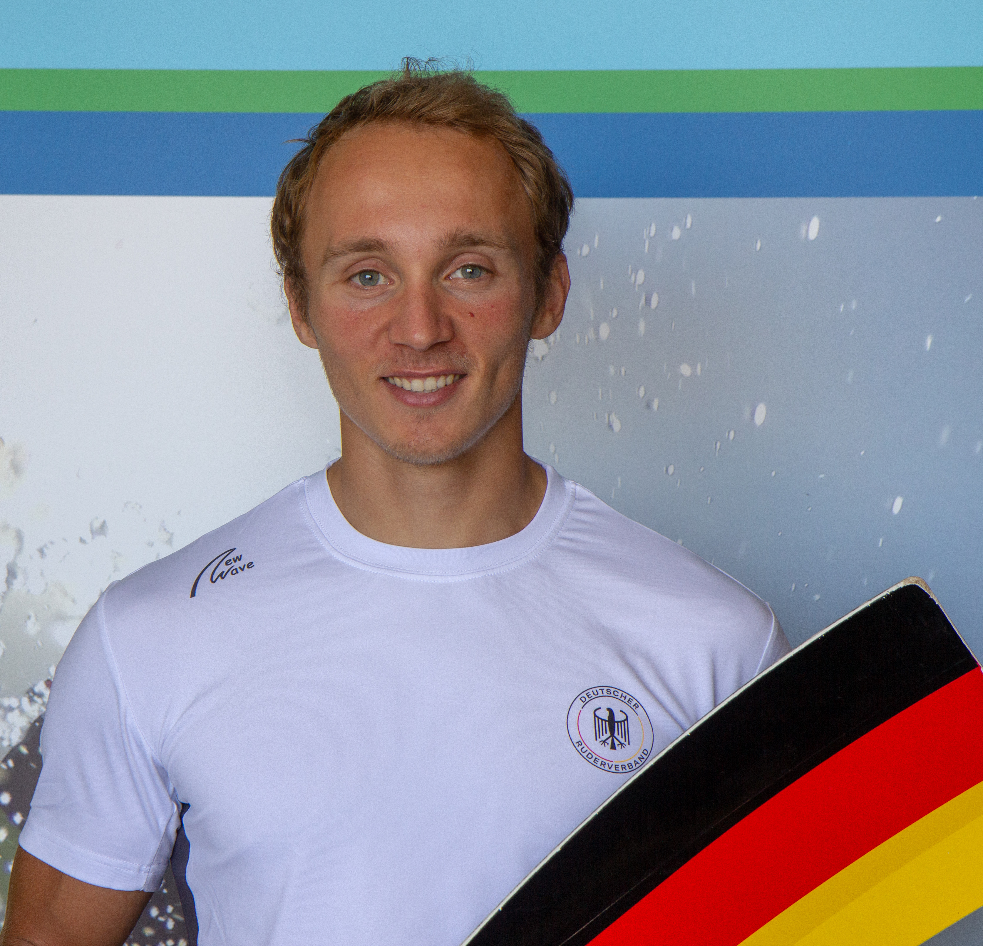 Jonathan Rommelmann bei Medientag des Deutschen Ruderverbandes in der Ruderakademie Ratzeburg am 22. August 2018.